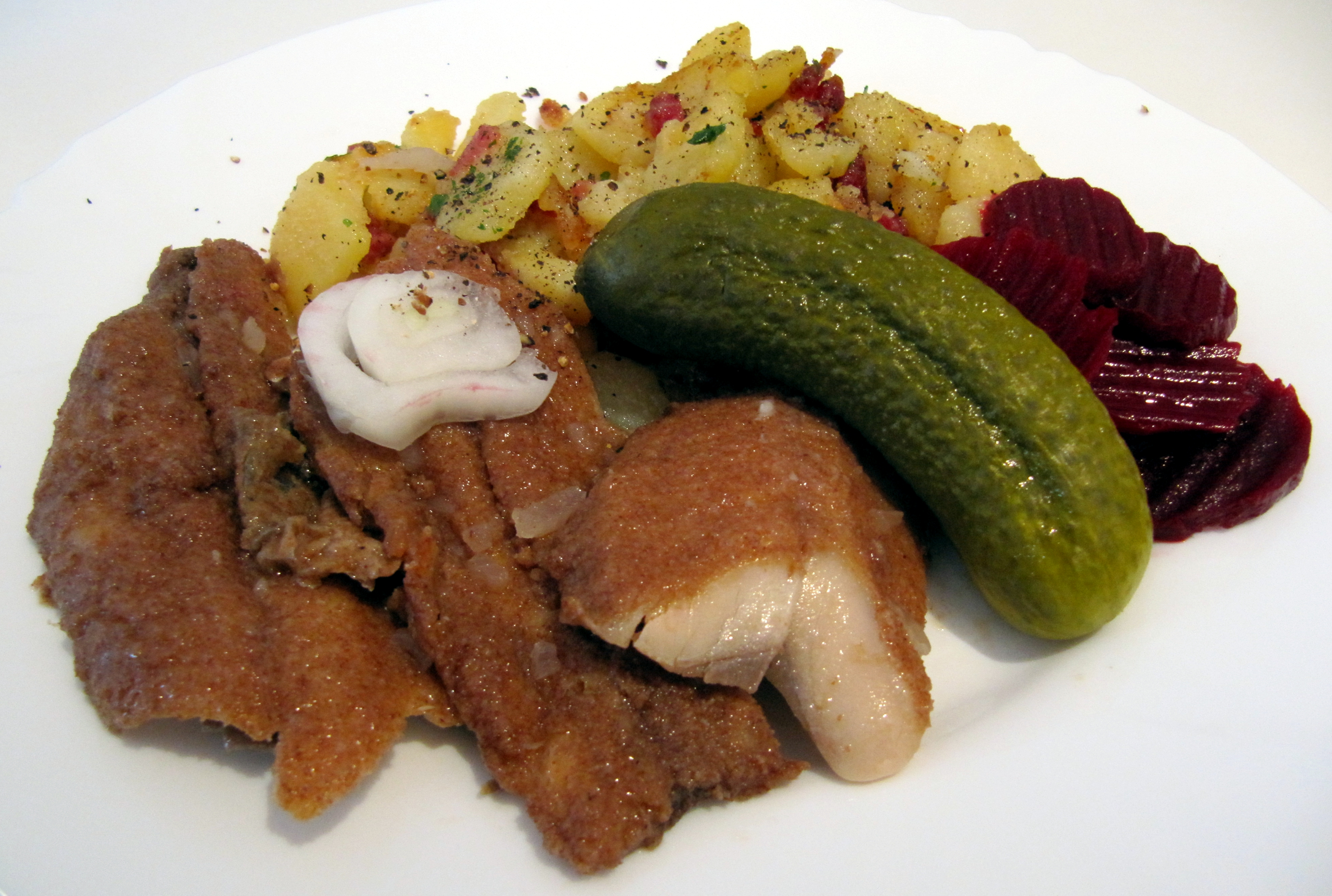 GT_Brathering_3